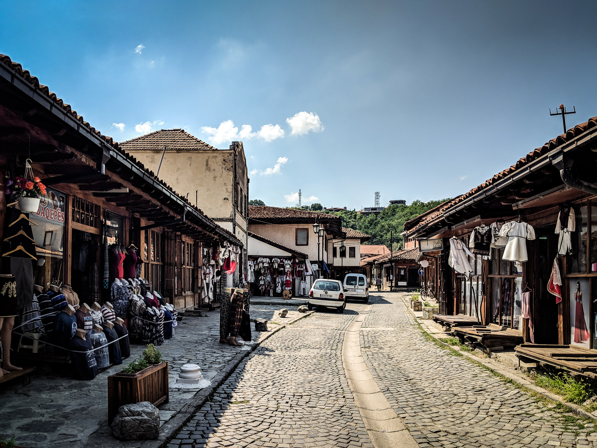 Veshje tradicionale, Tregu i Gjakovës